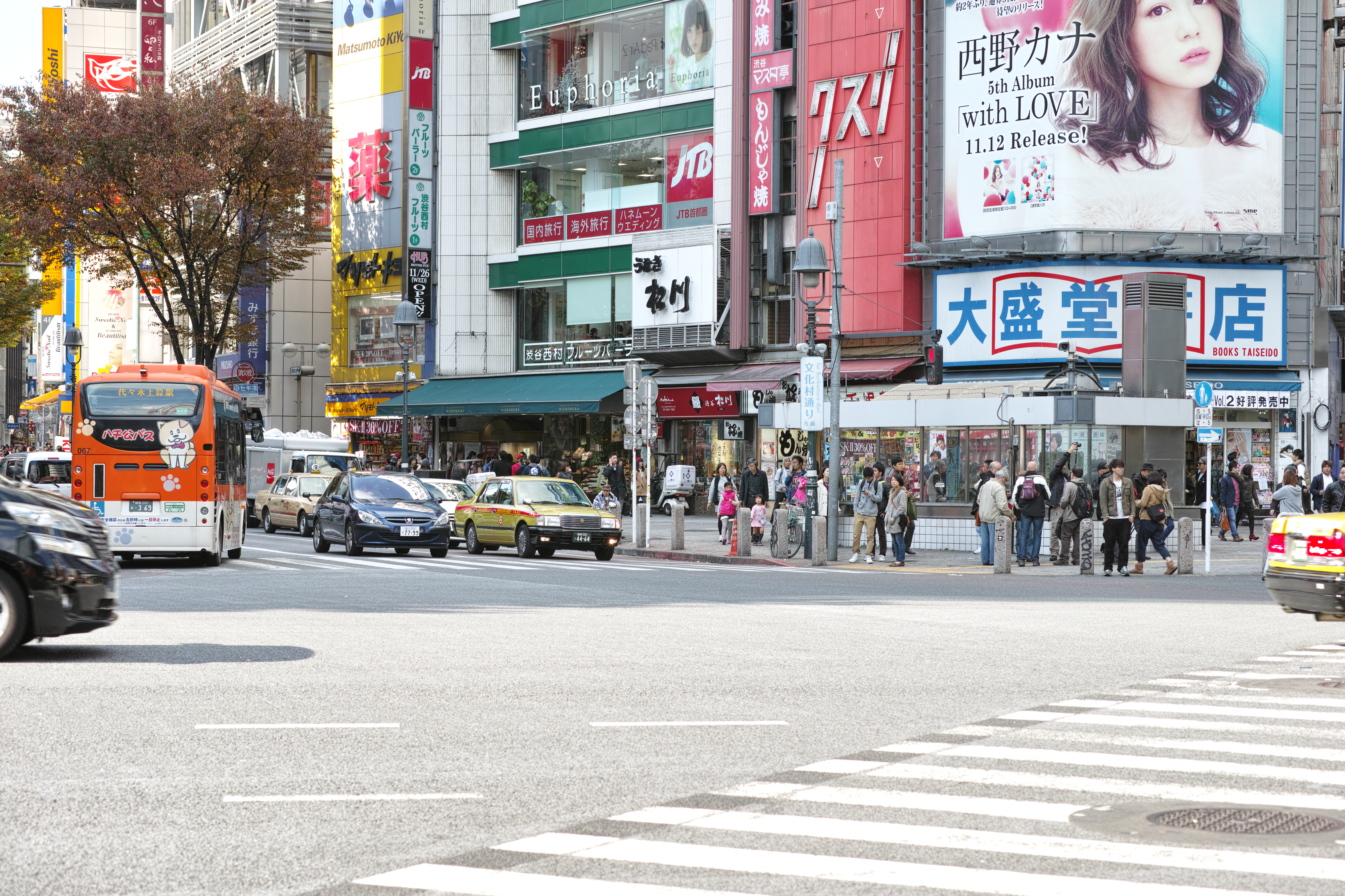 西野カナ